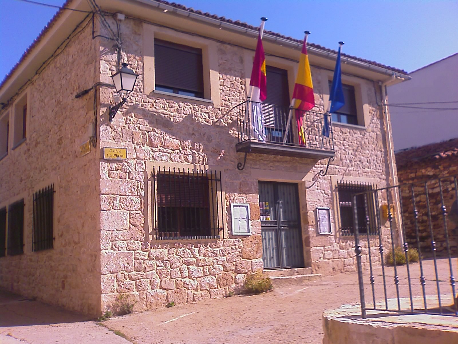 Ayuntamiento de Condemios de Abajo (Guadalajara, España)